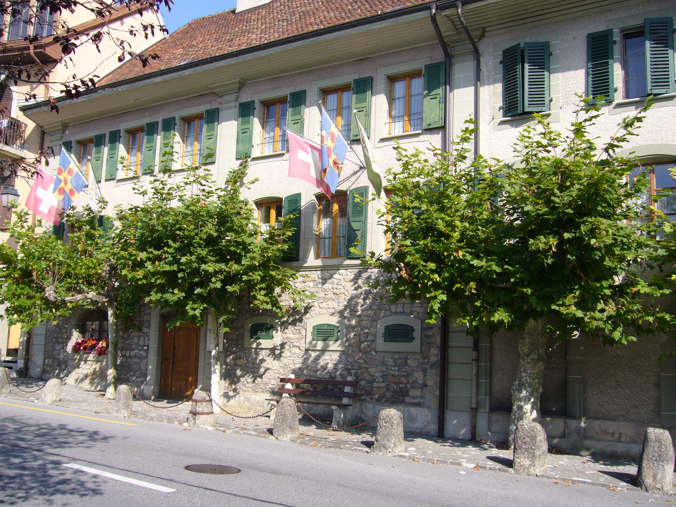 Gemeindehaus Chexbres, Kanton Waadt, Schweiz